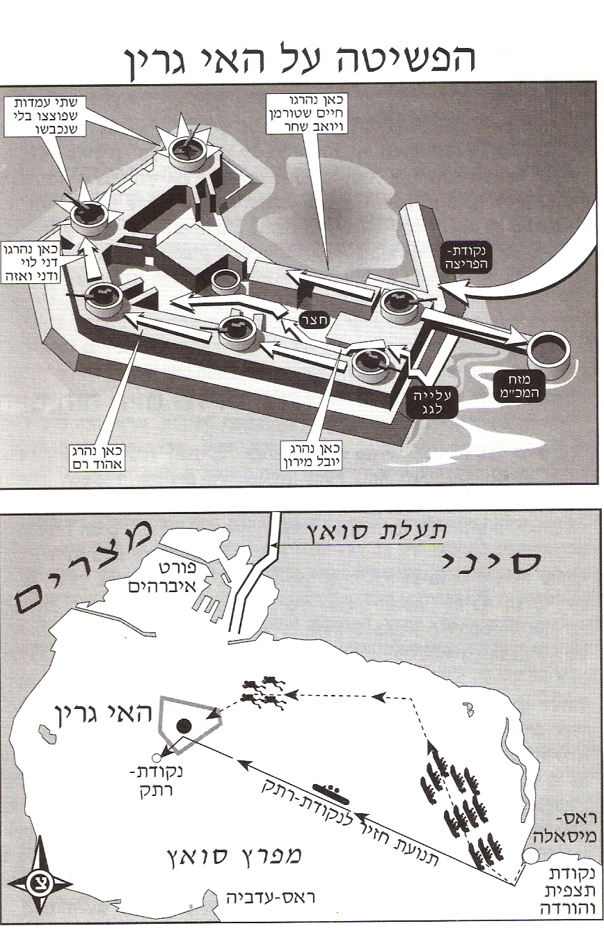 תיאור הפשיטה על האי גרין